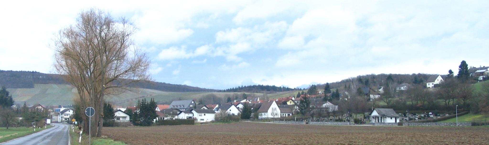 Schweppenhausen von Richtung Süden